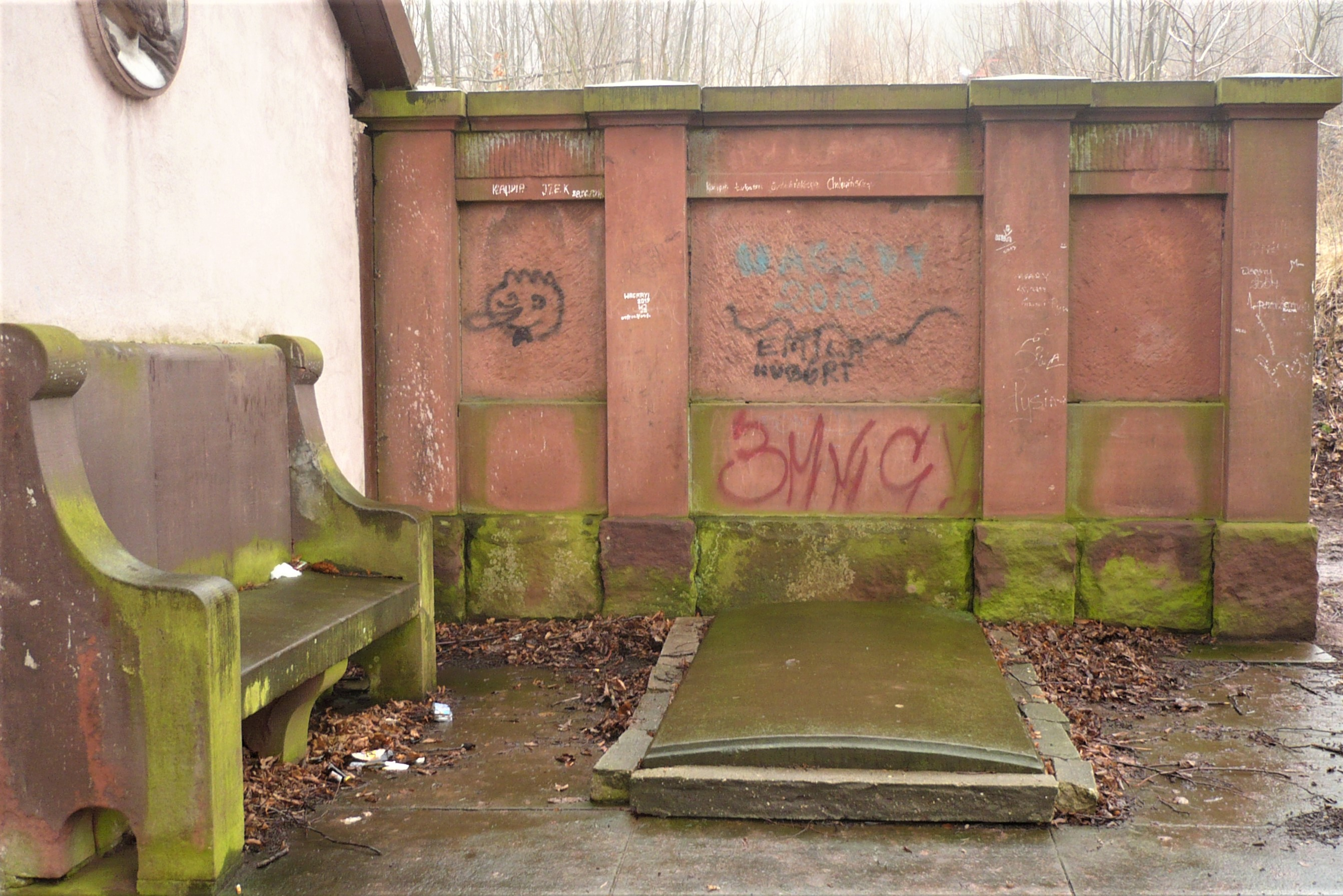 Kaplica dziękczynna w Nowej Rudzie - Słupcu